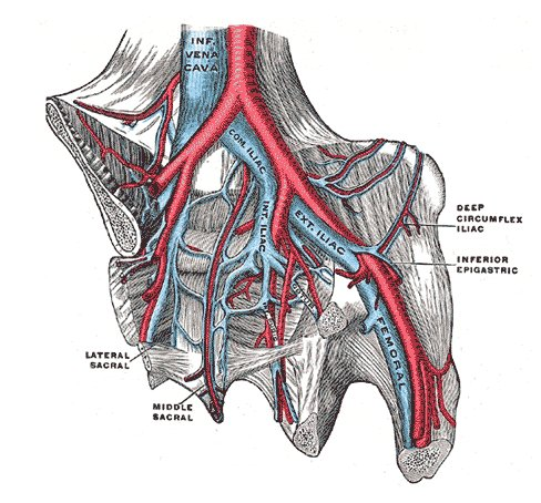 veine ilique